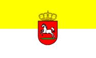 Königreich Hannover, Staatsflagge